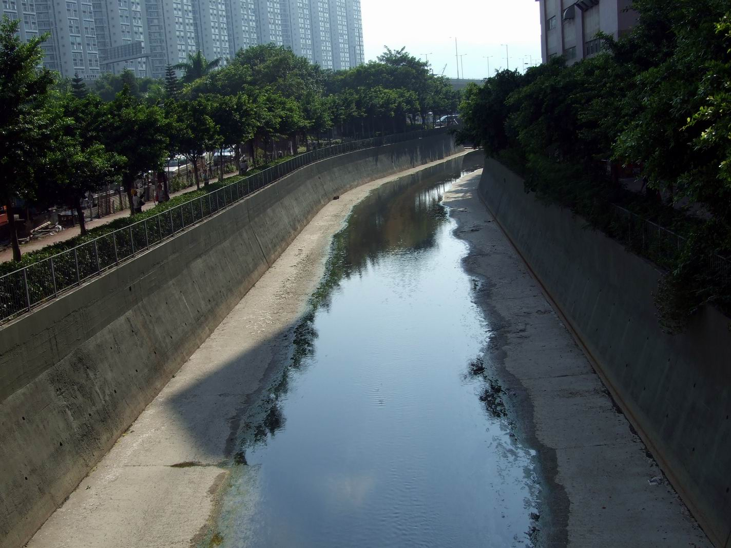 中文（香港）: 觀塘明渠